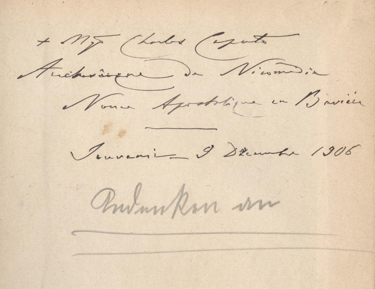 Carlo Caputo, Apostolischer Nuntius in Bayern, handschriftliche Buchwidmung